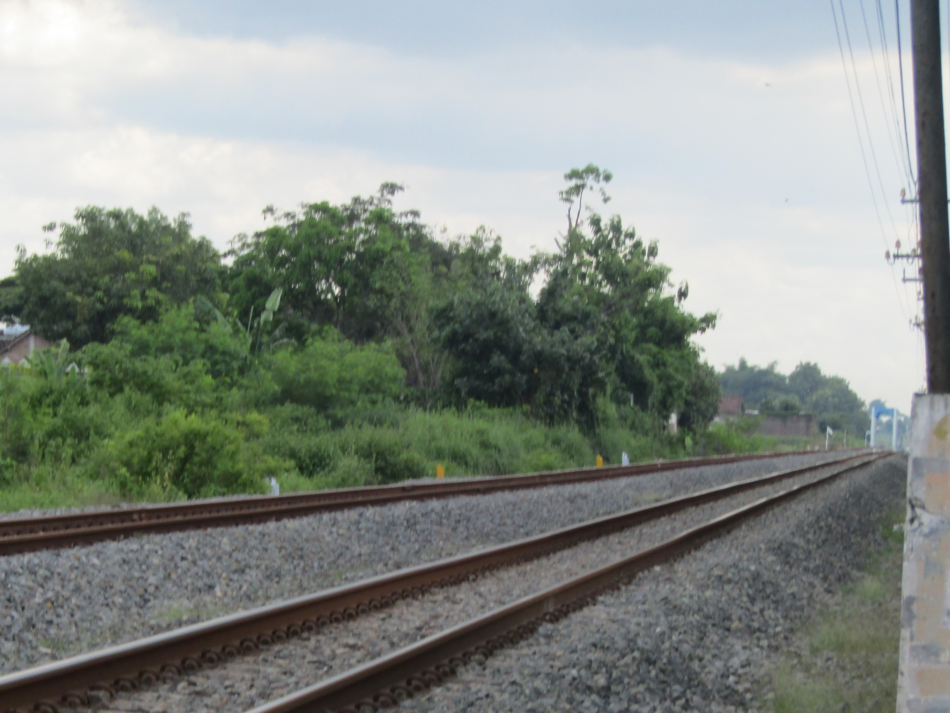 Bangunan Stasiun Grompol yang sudah dinonaktifkan, dan sudah dirobohkan karena terkena dampak pembangunan jalur ganda Solo-Kedungbanteng